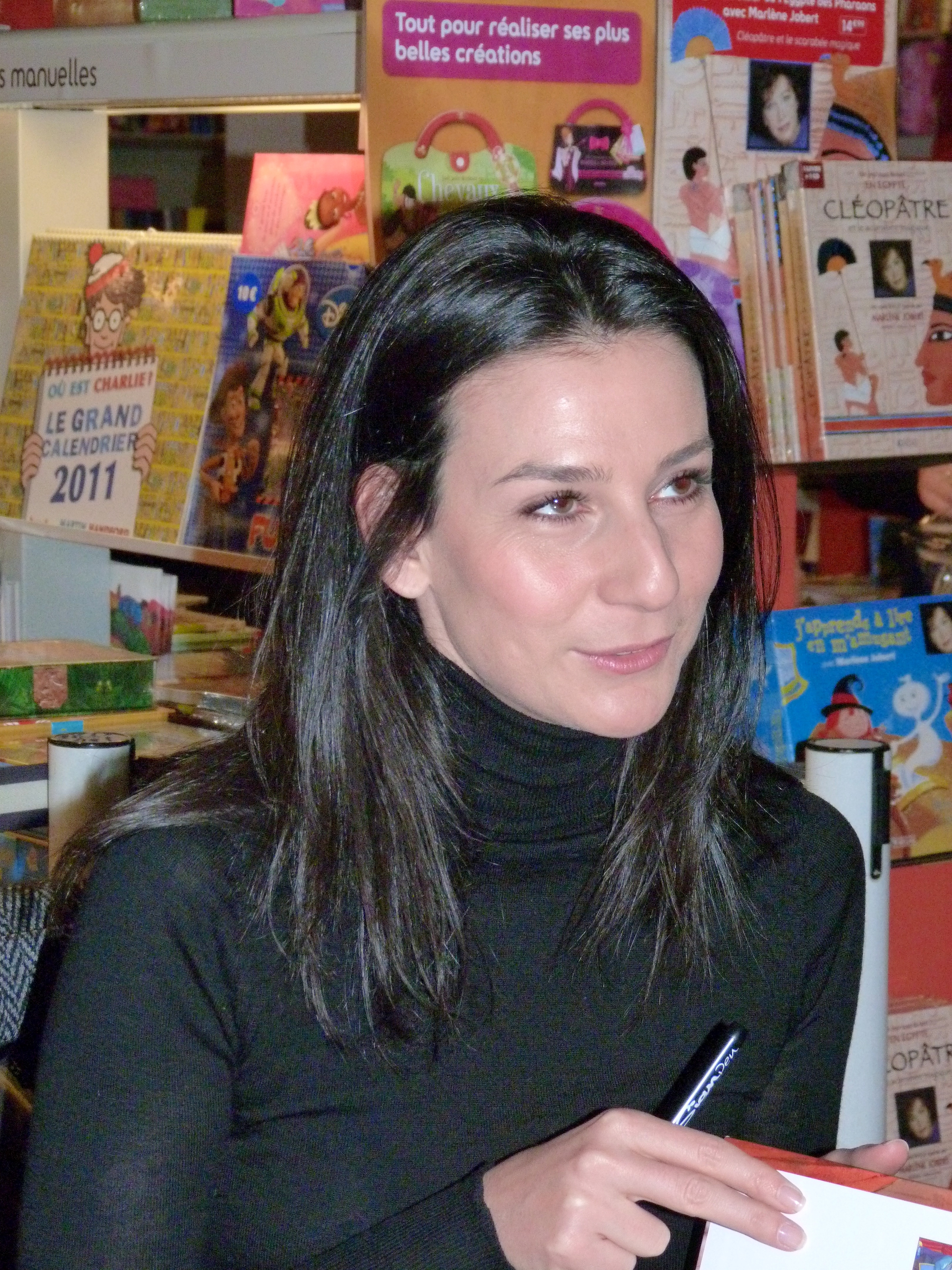 Marie Drucker, lors de la présentation du livre-CD pour enfant réalisé avec Valérie Lenoir La Perruque de Joseph Haydn, le 28 novembre 2010 à la FNAC Montparnasse, Paris